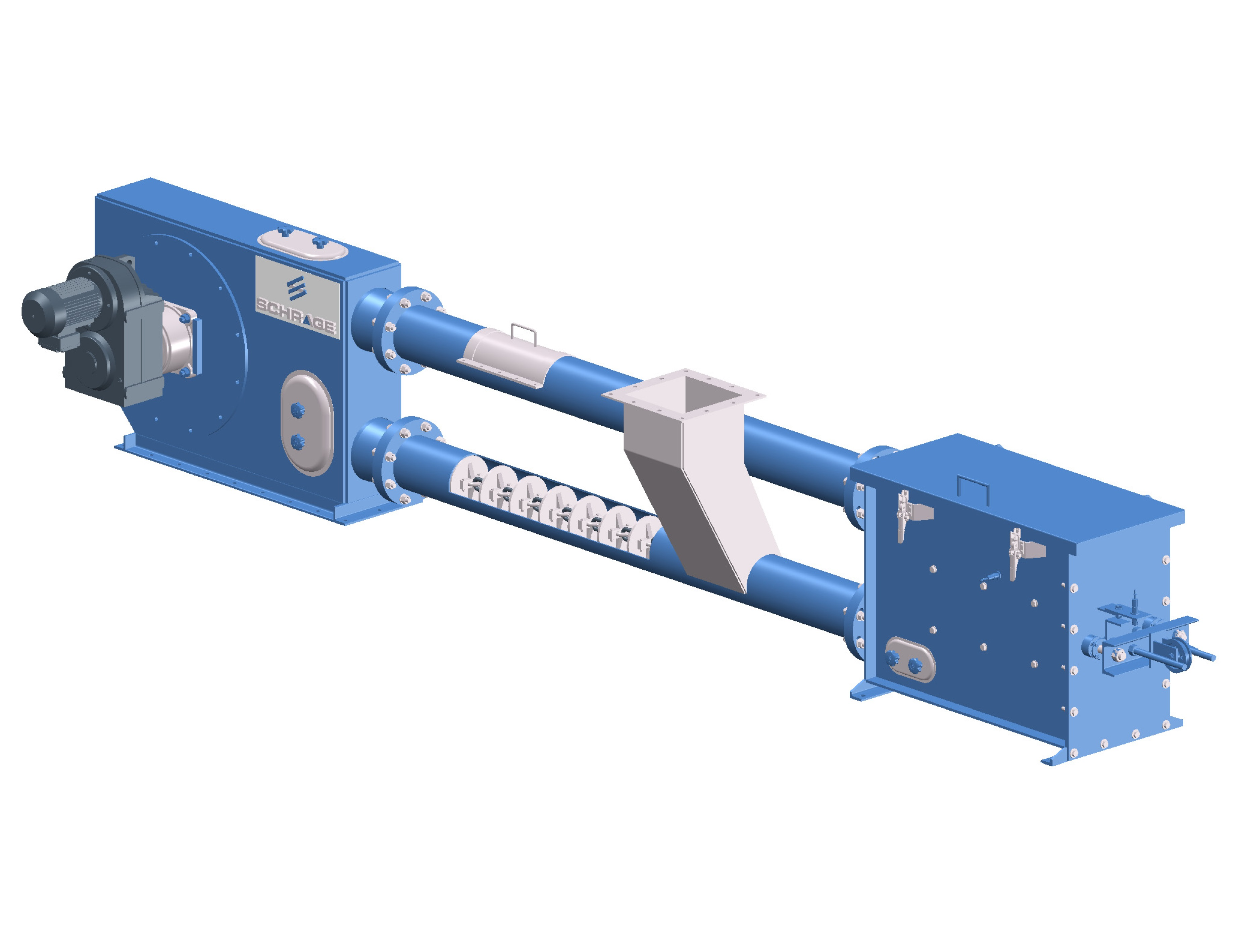 Rohrkettenförderer in stehender Bauweise (Rohre übereinander)